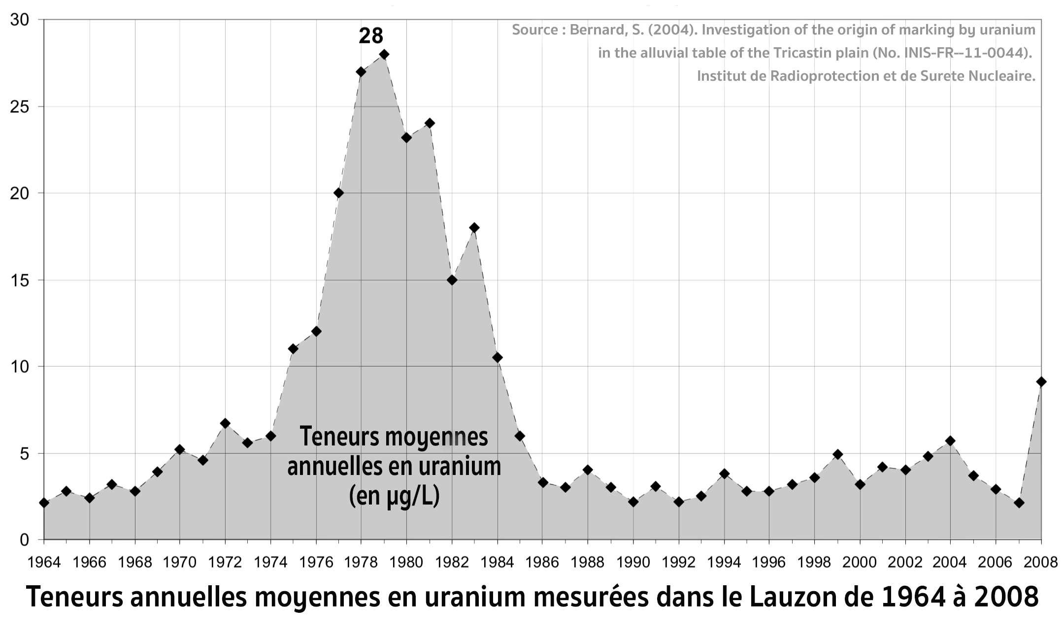 Graphique présentant l'évolution temporelle de la teneur de la rivière Lauzon en uranium, d'après données IRSN (2010, voir plus bas). Dans le Lauzon, le taux d'uranium (moyenne annuelle) a sans cesse dépassé 10 μg/L de 1974 à 1984 avec un pic à 28 μg/L en 1979. Selon des calculs faits ensuite sur la base du débit de la rivière (1700 m3/h environ), on a estimé que 2 tonnes d’uranium environ ont ainsi été transportées par ce cours d'eau (Lauzon) en 10 ans. Selon un rapport récent : "La relation entre la pollution chronique du Lauzon au cours des années 1970-1980 et la pollution de la nappe sur le site de COMURHEX est étayée notamment par deux éléments. La décroissance du pic de concentration dans le Lauzon est contemporaine des contre-mesures prises sur le site. Les teneurs mesurées à l’époque à la sortie immédiate du site nucléaire, sont deux à trois fois supérieures à celles mesurées dans le Lauzon (croisement avec la RD8). Ce facteur de dilution est confirmé par les variations de débit de la Gaffière mesurées lors de la campagne de mars 2009 (Cf. § 2.5) entre la sortie du site (529 m3/h) et le Château de la Bâtie (1702 m3/h)". Source : p 72 du rapport Bernard S & al. (2010) [ Etude sur l’origine du marquage par l’uranium dans la nappe alluviale de la plaine du Tricastin | IRSN | DEI/2010-004 |PDF, 159 pages.